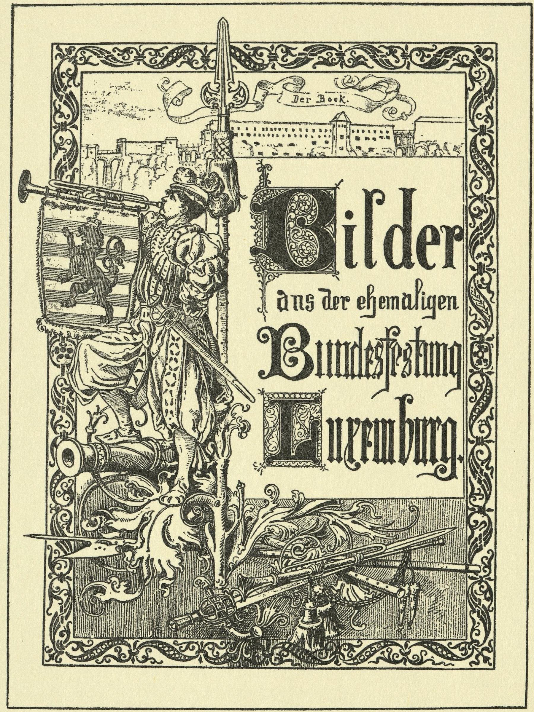 Dessin pittoresque de la forteresse de la Confédération germanique (Bundesfestung) Luxembourg par Michel Engels (1851-1901): I - Frontispice allégorique